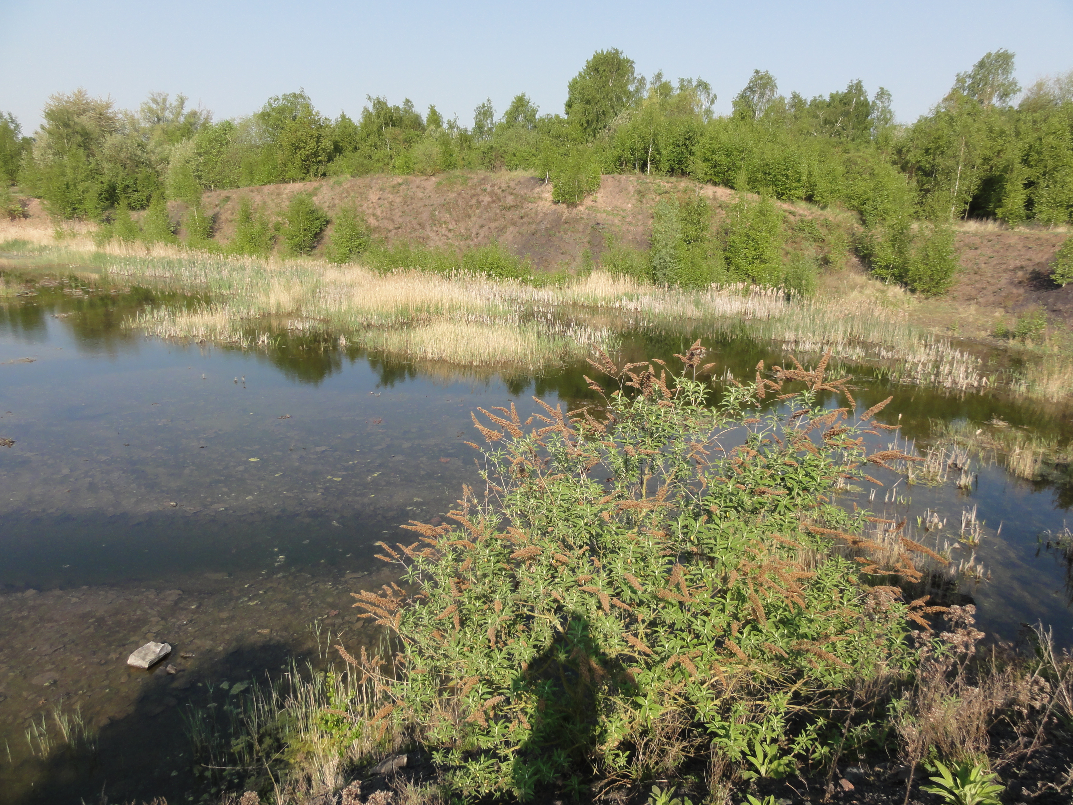 Terril n° 125, Sainte Marie Est, fosse Sainte-Marie de la Compagnie des mines d'Aniche dans le bassin minier du Nord-Pas-de-Calais, Auberchicourt, Nord, Nord-Pas-de-Calais, France.